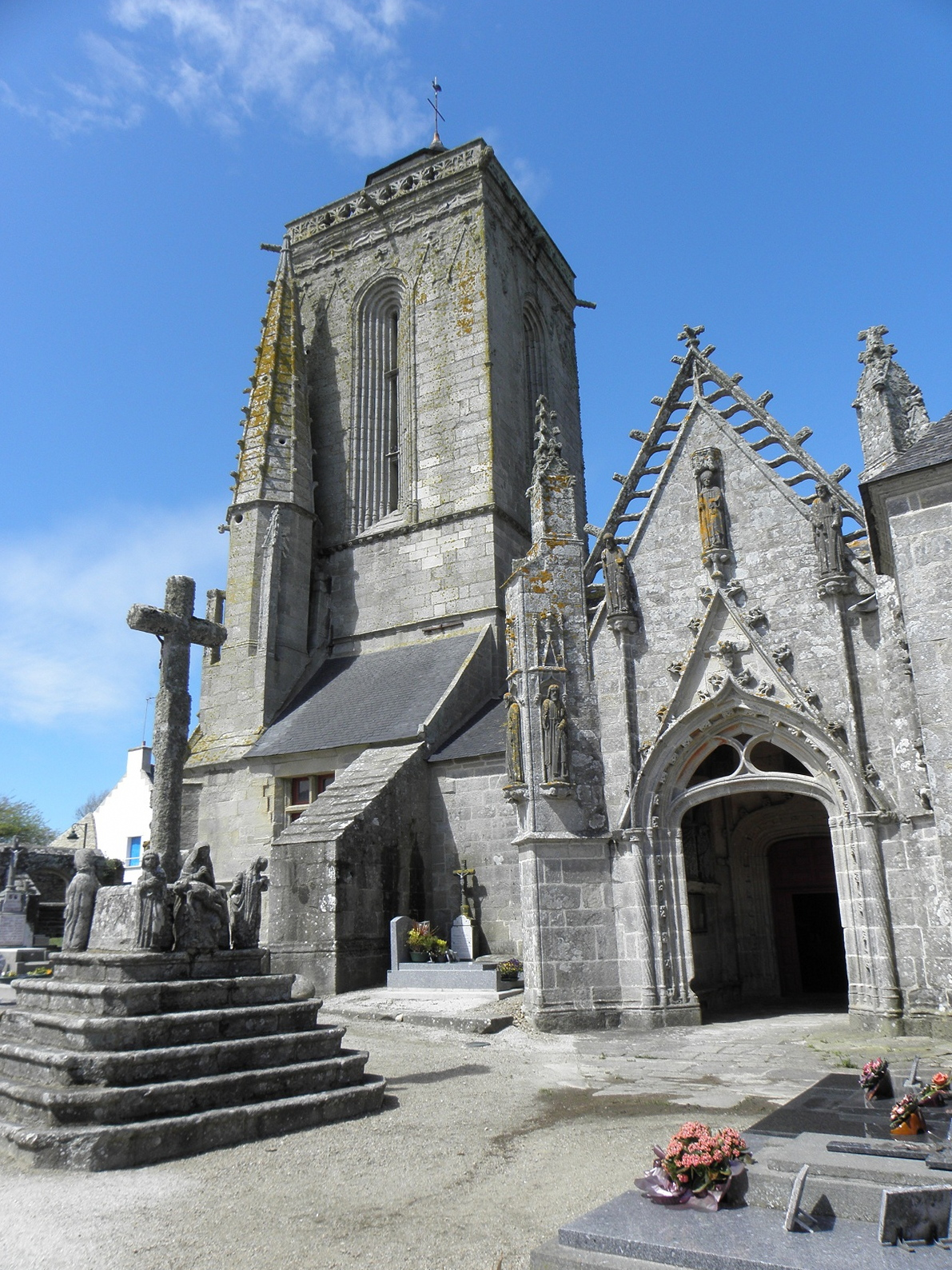 Calvaire, porche sud et tour-clocher de la chapelle Saint-Tugen en Primelin (29).